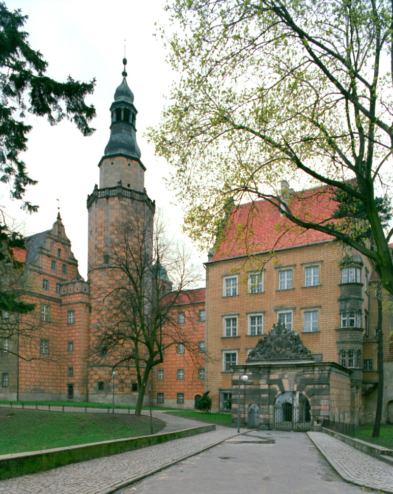 Oleśnica